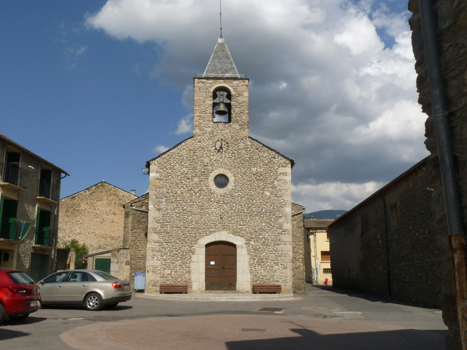 Eglise de Palau-de-Cerdagne, Pyrénées-Orientales, France